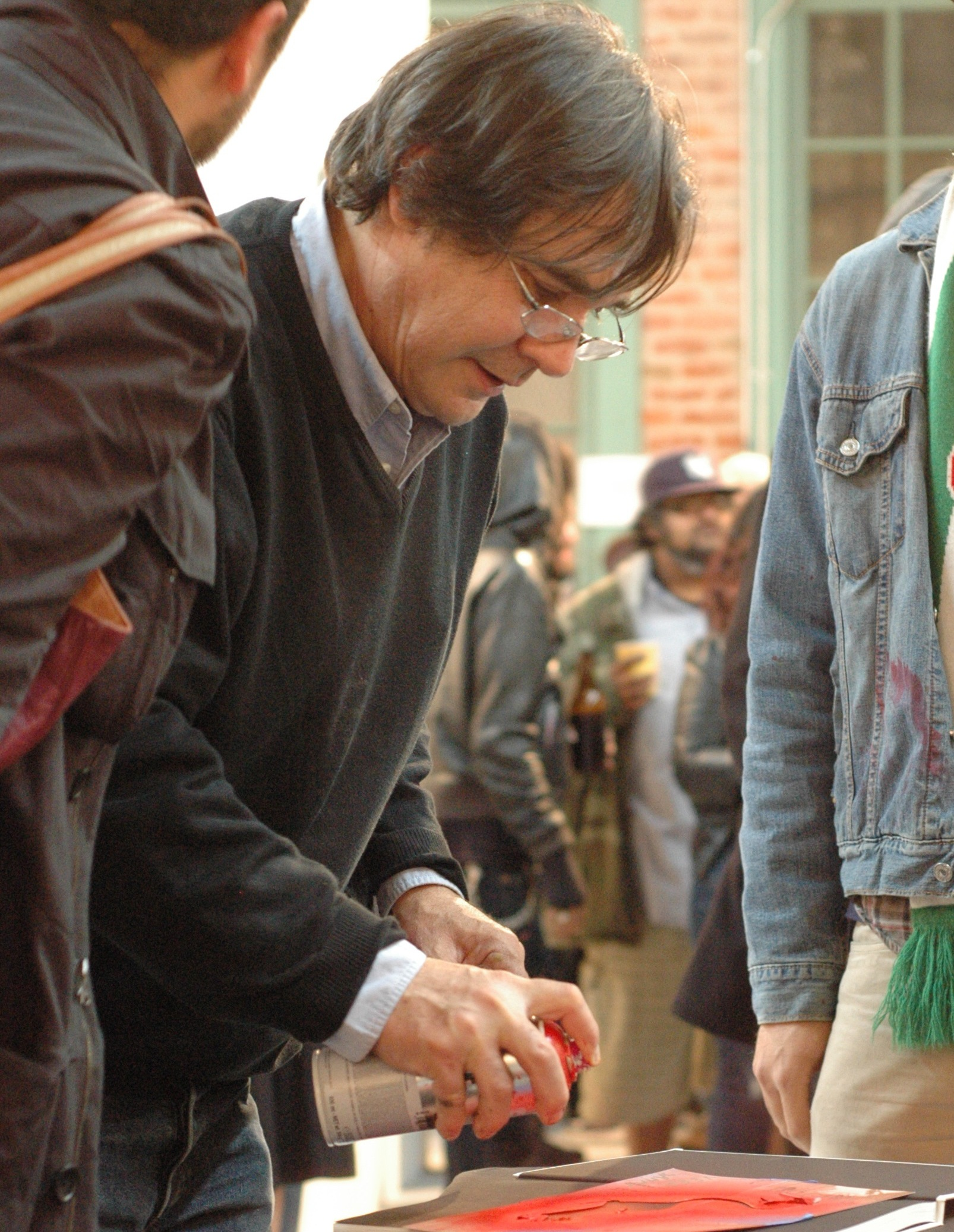 Xavier Prou (Blek le Rat) signing his books (November 20, 2011)